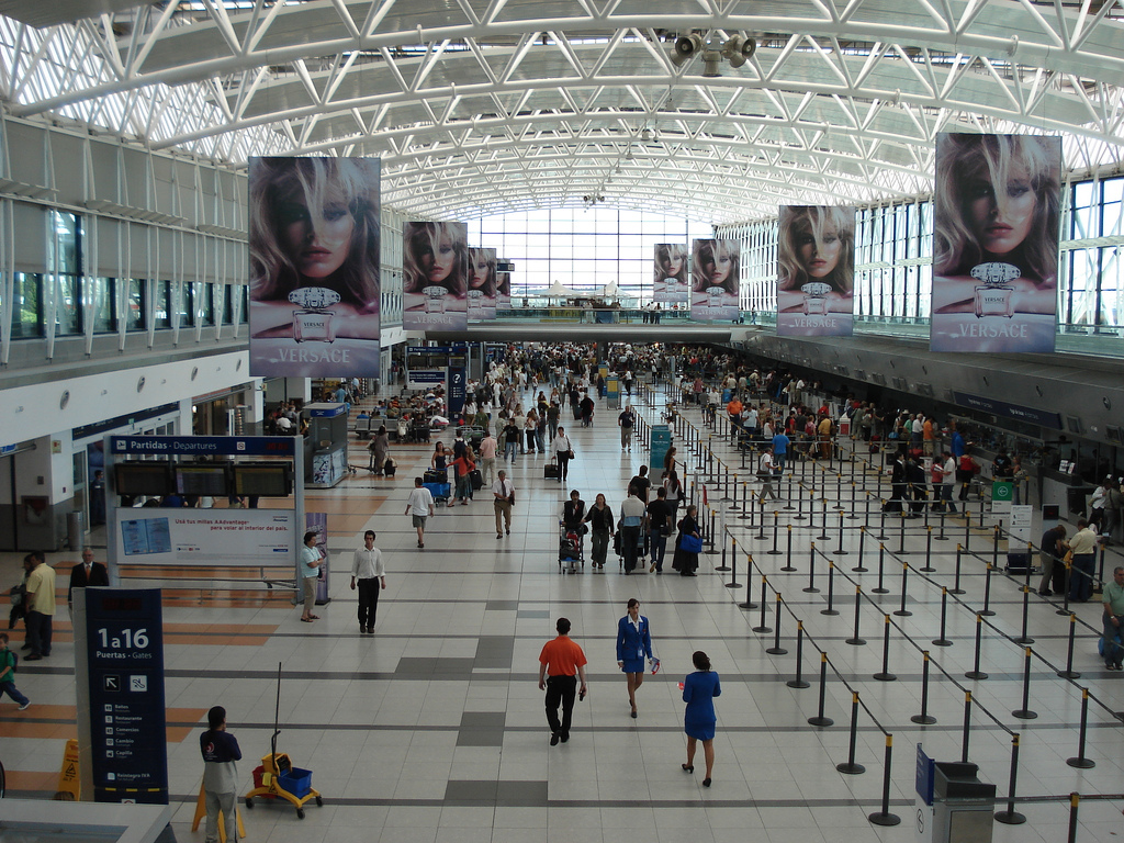 Aeropuerto Internacional de Ezeiza (SAEZ), terminal A. Ezeiza, Provincia de Buenos Aires, Argentina.